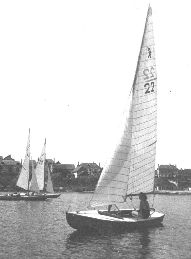 Caneton Brix à Muids-sur-Seine